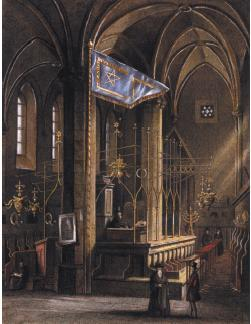 Interiér Staronové synagogy (1838)